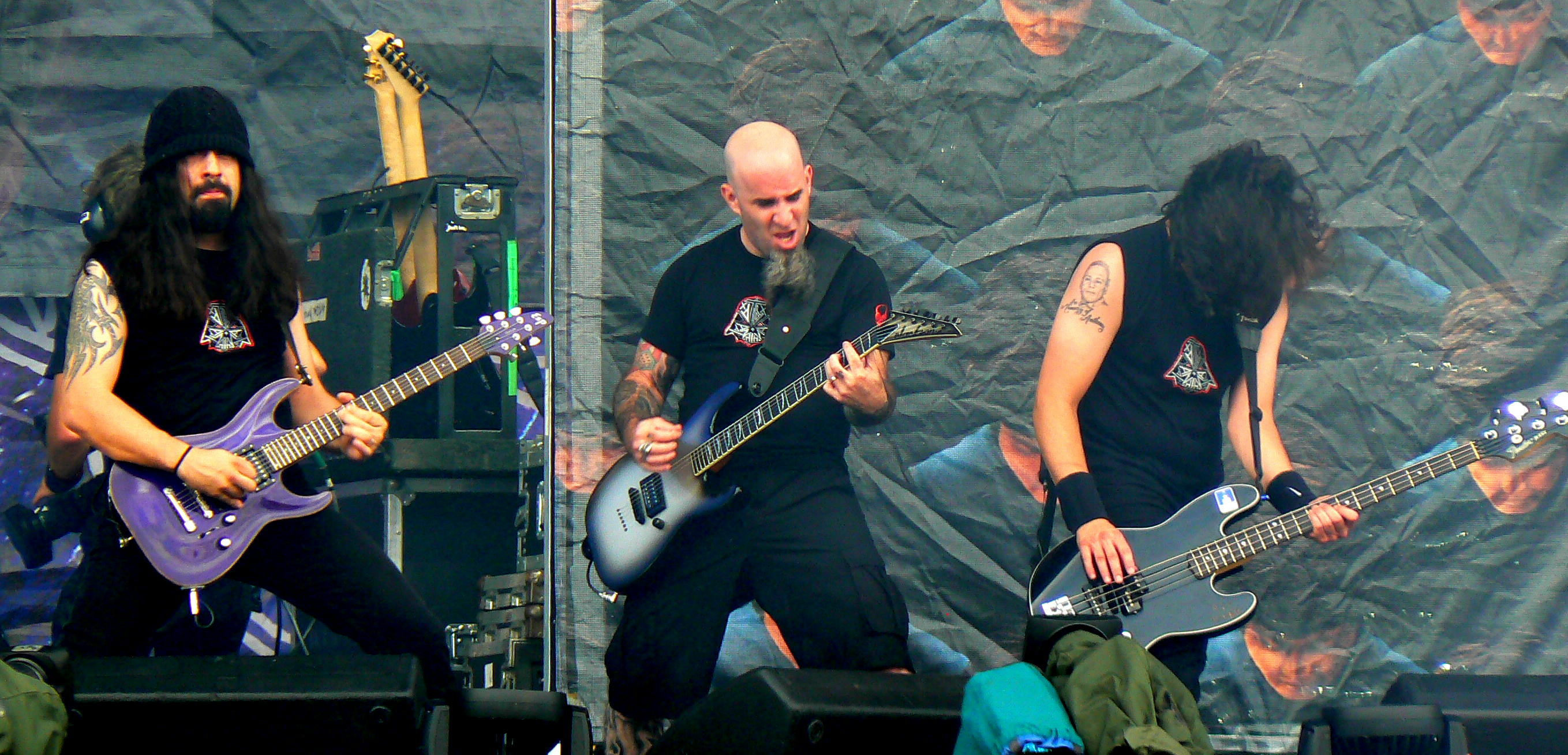 Rob - Scott - Frank